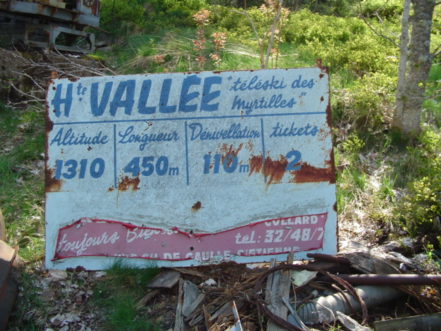 station de la haute vallée